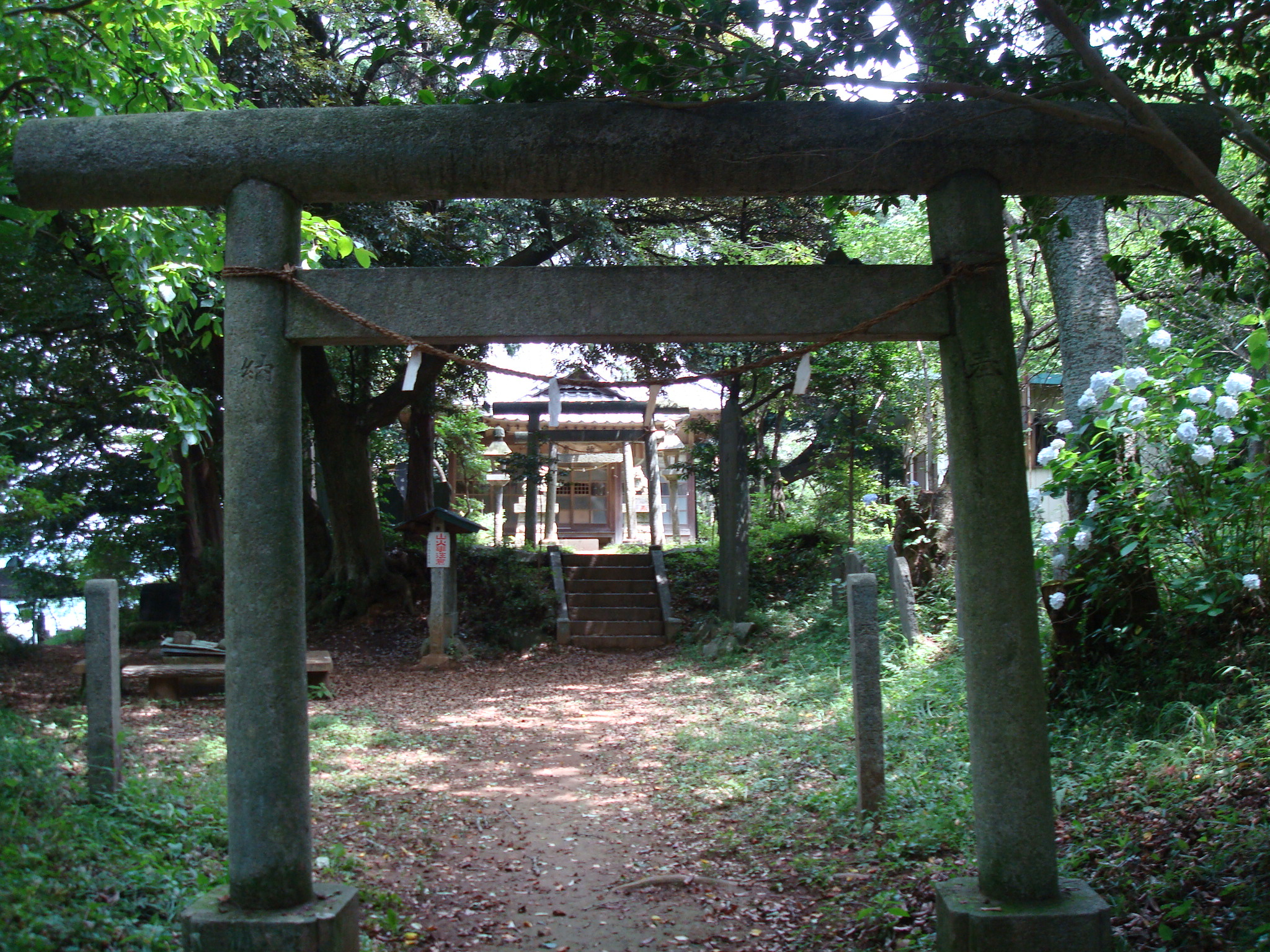 御嶽山 (桜川市)山頂付近の御嶽神社